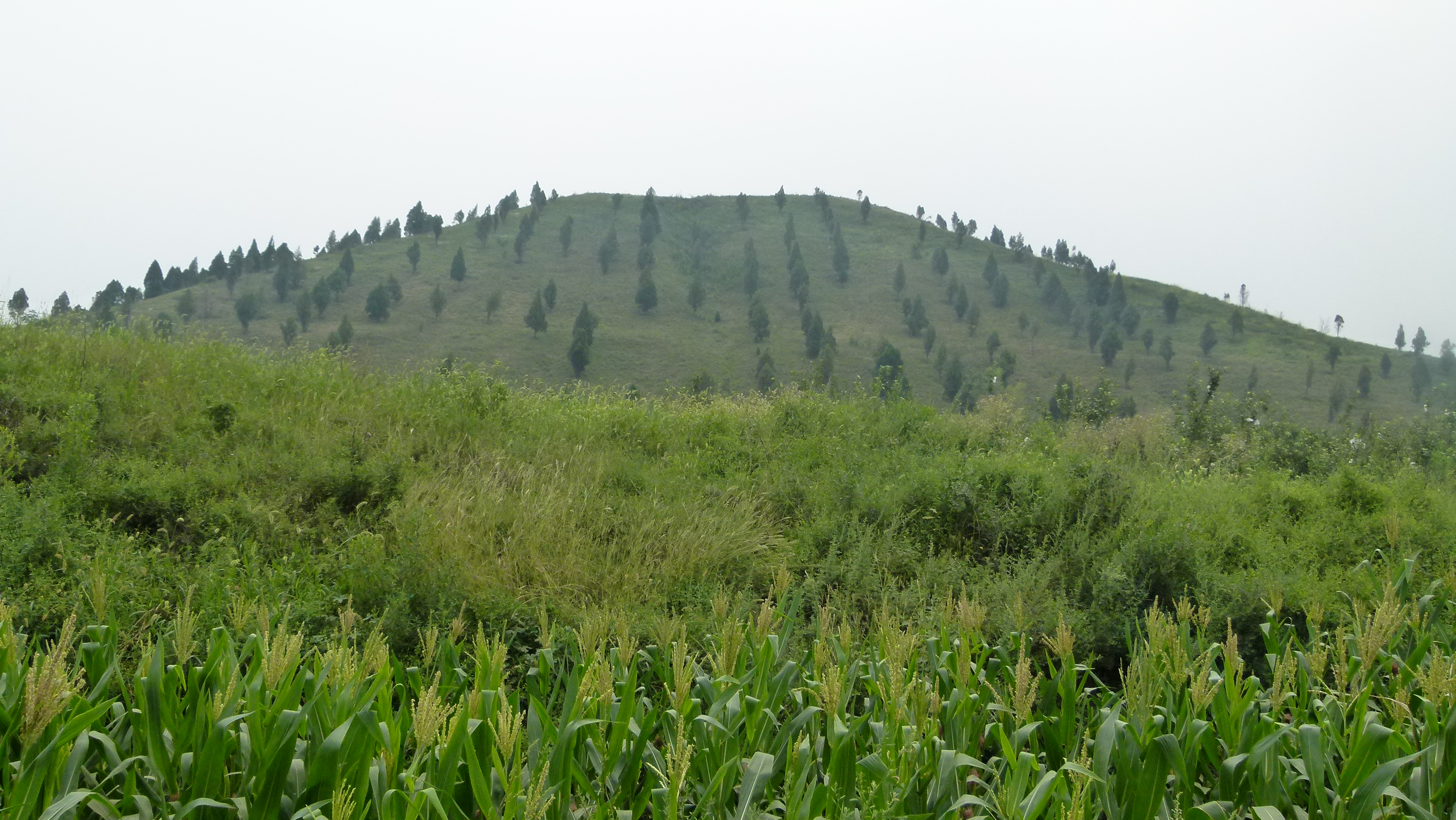 Maoling - Grab der Kaiserin, in der Nähe von Xi'an (China)